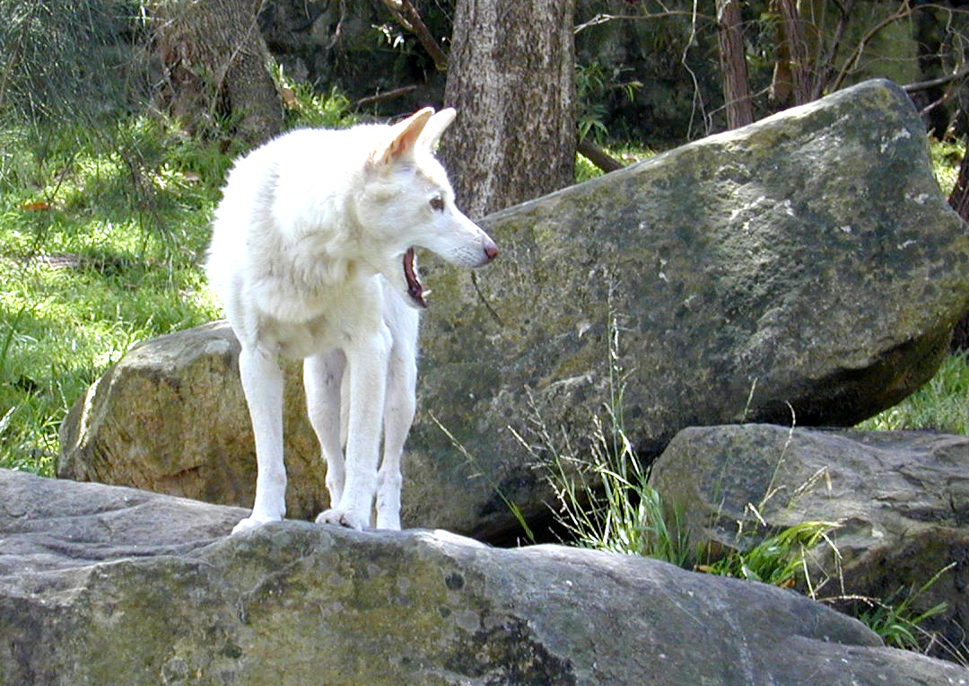 White dingo (Canis lupus dingo).